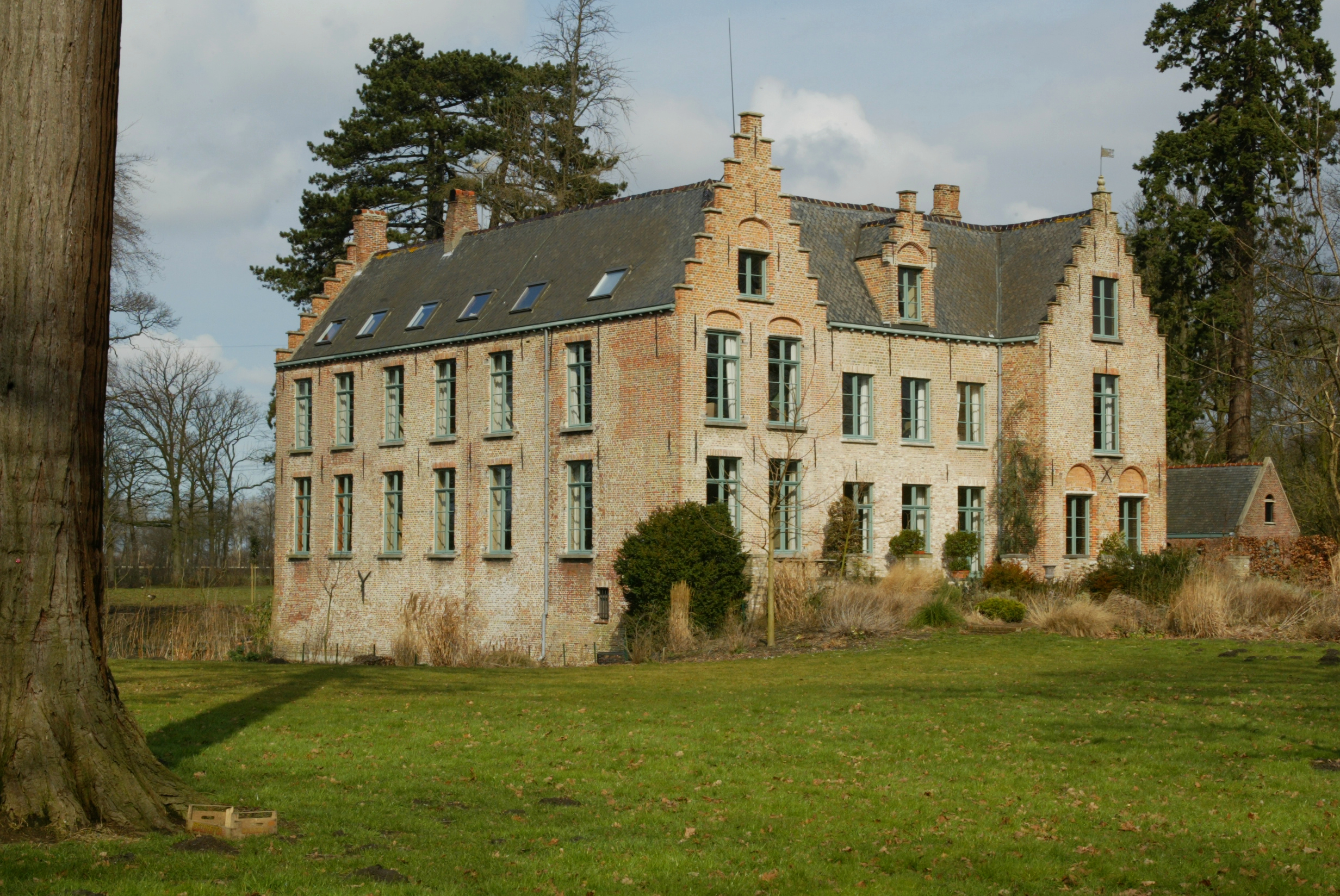 Voormalig kasteel Bloemendale te St-Andries This is a possible Onroerend Erfgoed: Find the monument in the Monuments database: Bloemendalestraat 8 in Brugge All Onroerend Erfgoed in Brugge Is this Onroerend Erfgoed? Yes No More images to work at in Category:Possible onroerend erfgoed.